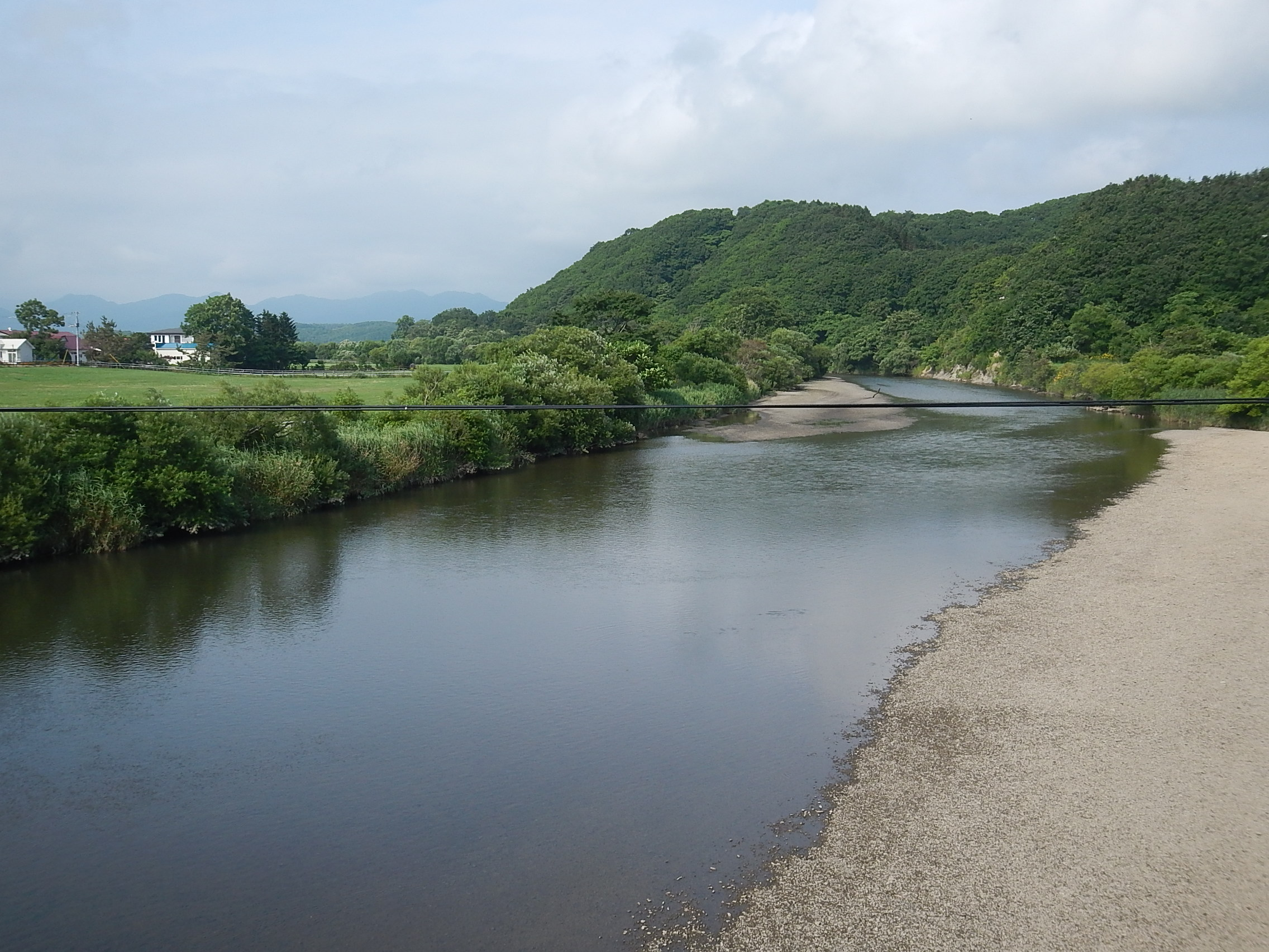 鳧舞橋より望む鳧舞川